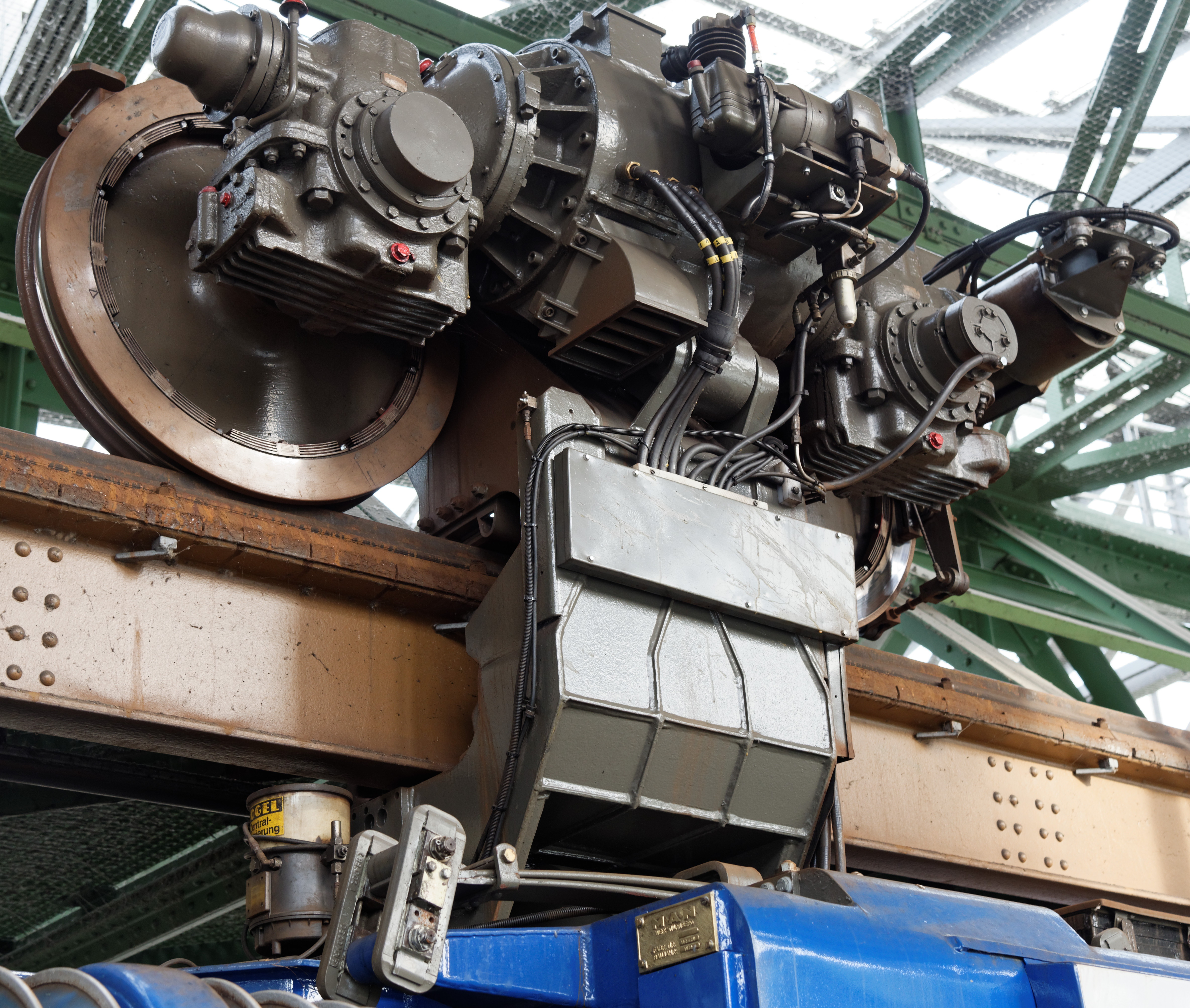 Antriebssatz einer aktuellen Schwebebahn in Wuppertal